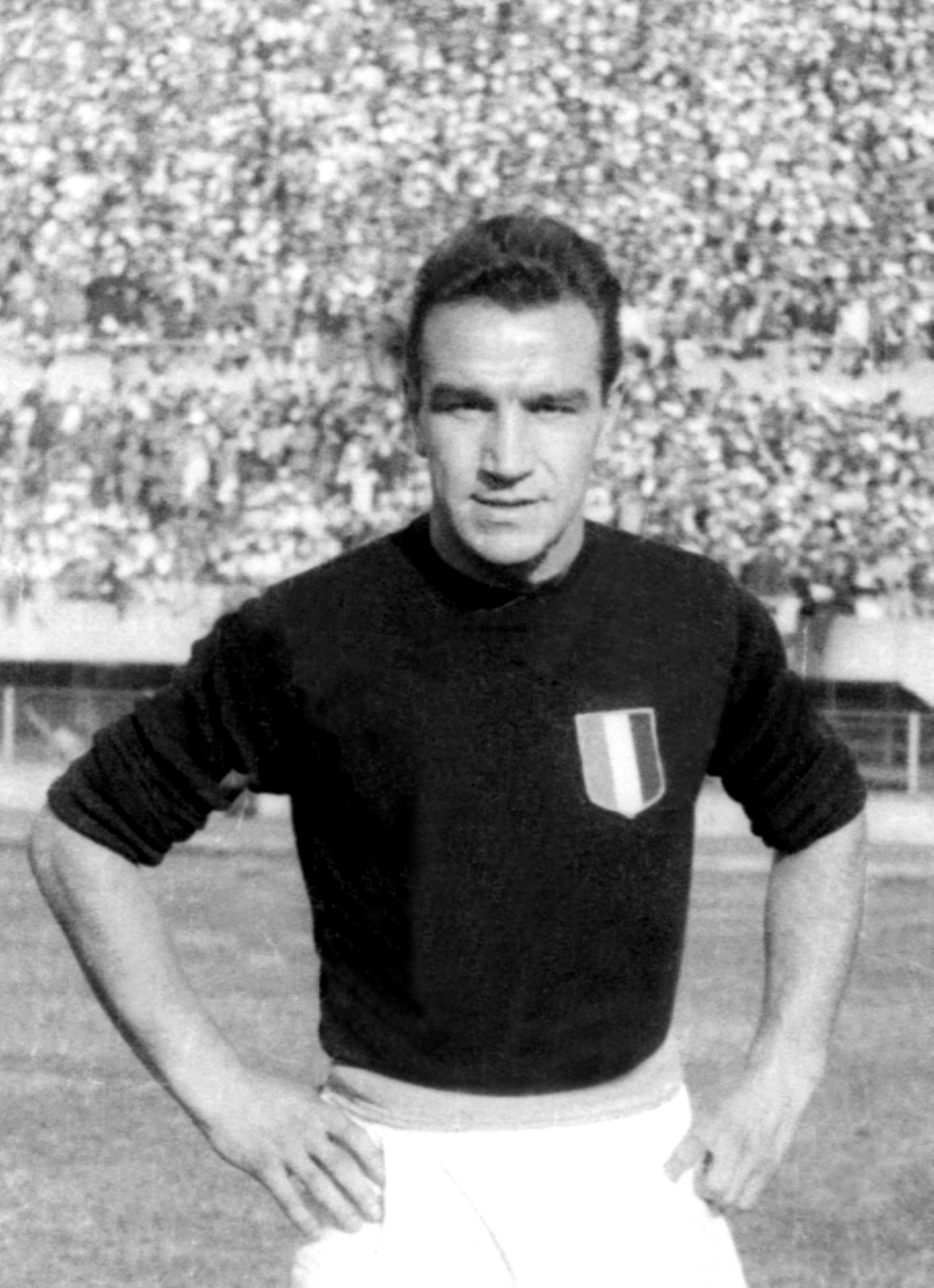 Il calciatore italiano Ezio Loik, con la maglia del Grande Torino, nella seconda metà degli anni quaranta del Novecento. Licensing Loik, Ezio Categoria:Immagini di Ezio Loik